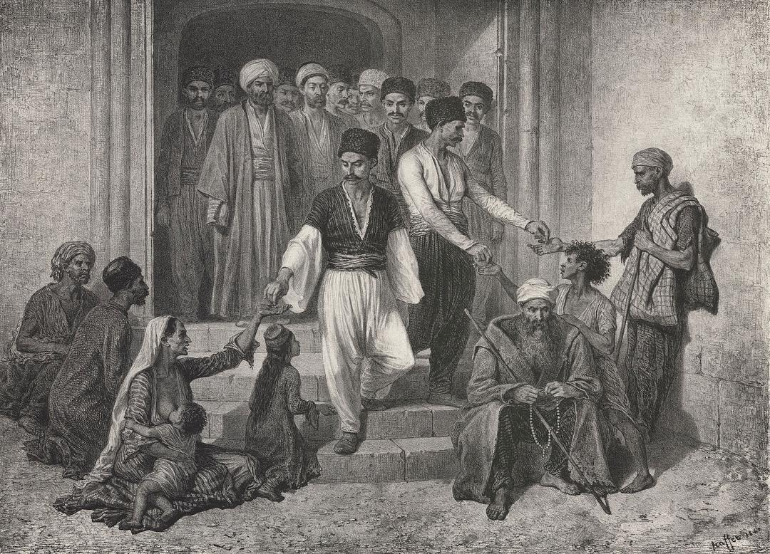 Крымские татары выходят из мечети и дают деньги чингене, собравшимся возле неё. Картина начала 19 века.